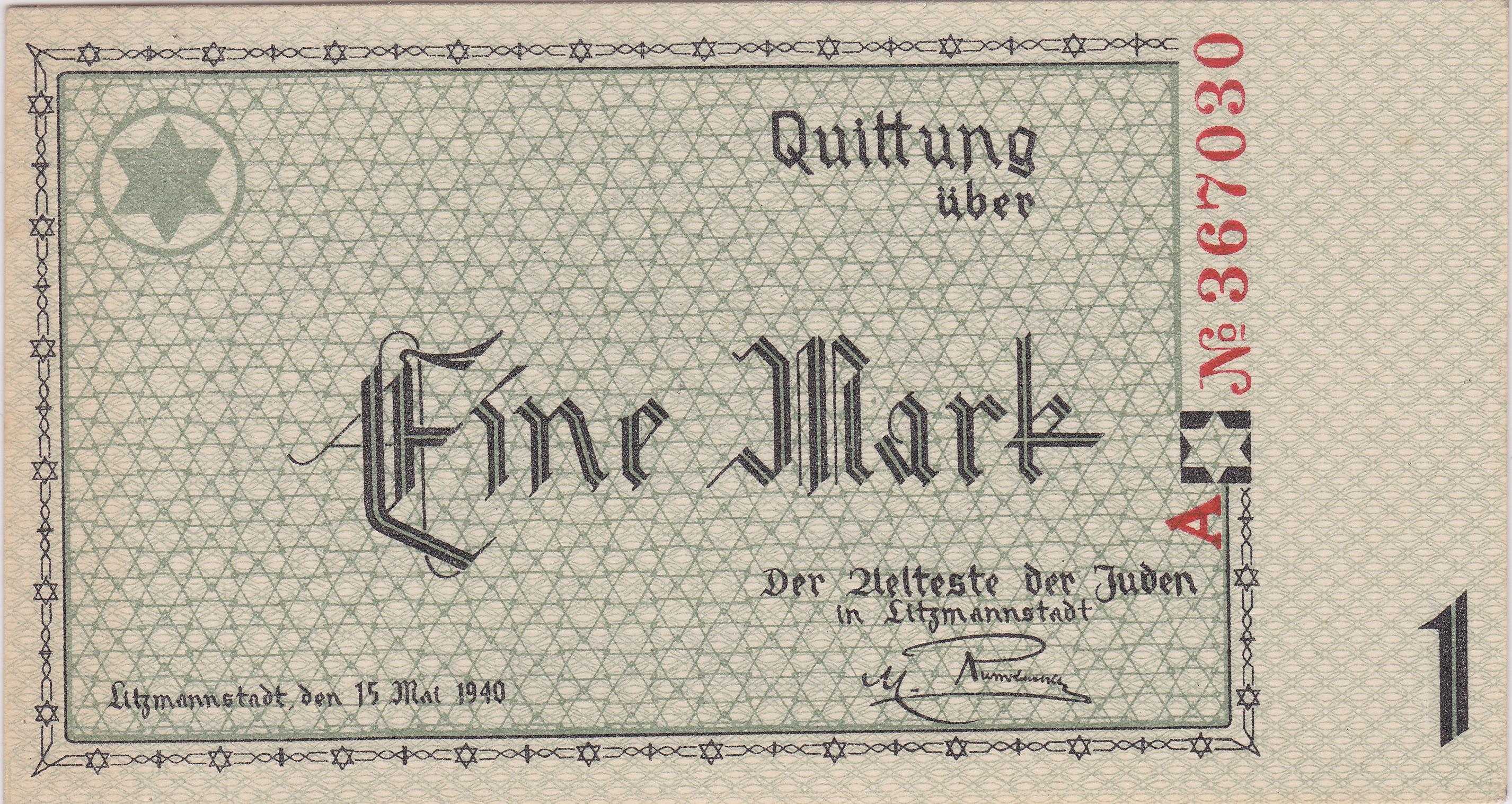 Skan banknotu getta w Łodzi pochodzący z moich zbiorów